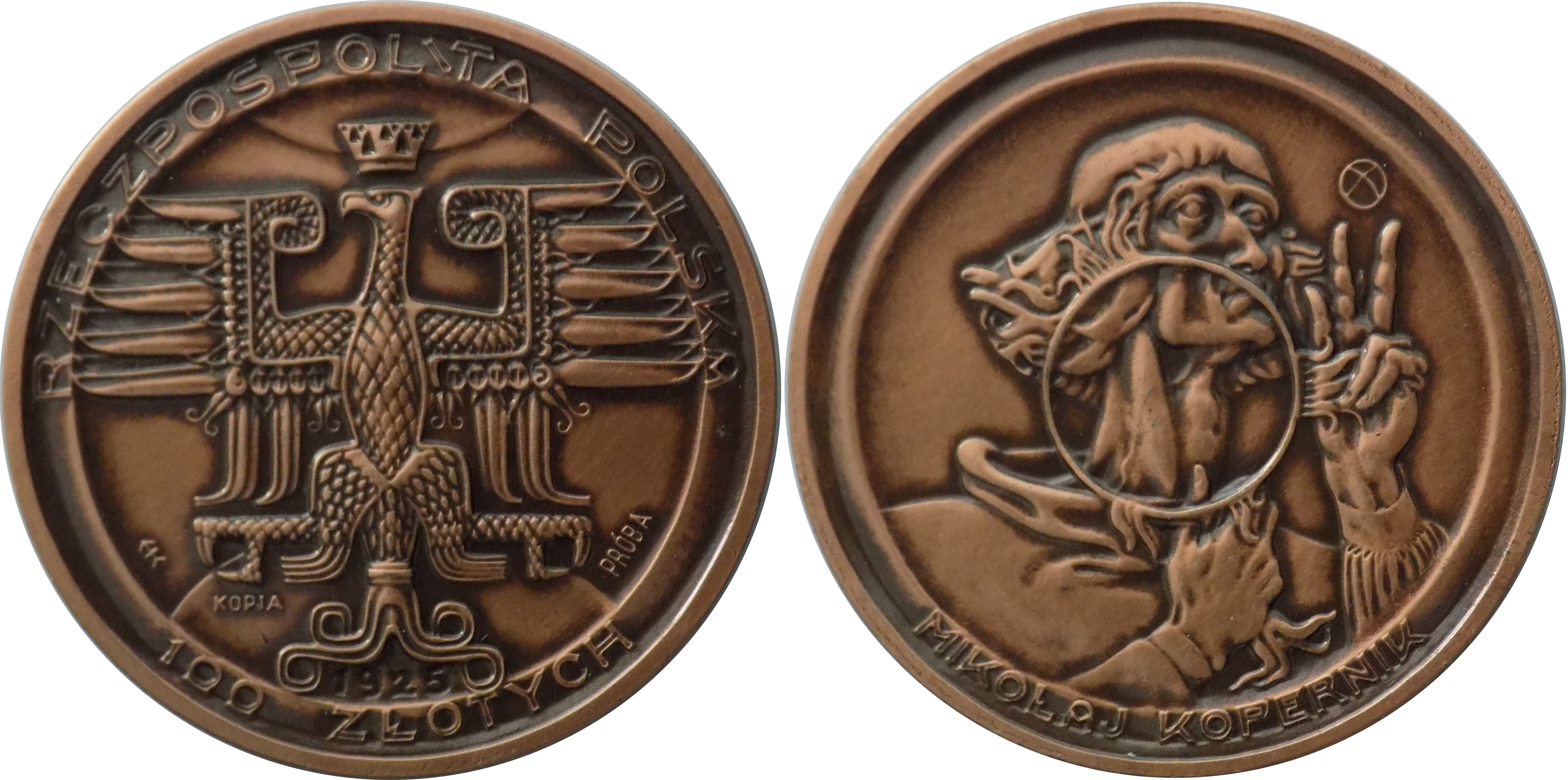 Replika 100 złotych 1925 Mikołaj Kopernik 35 mm miedź